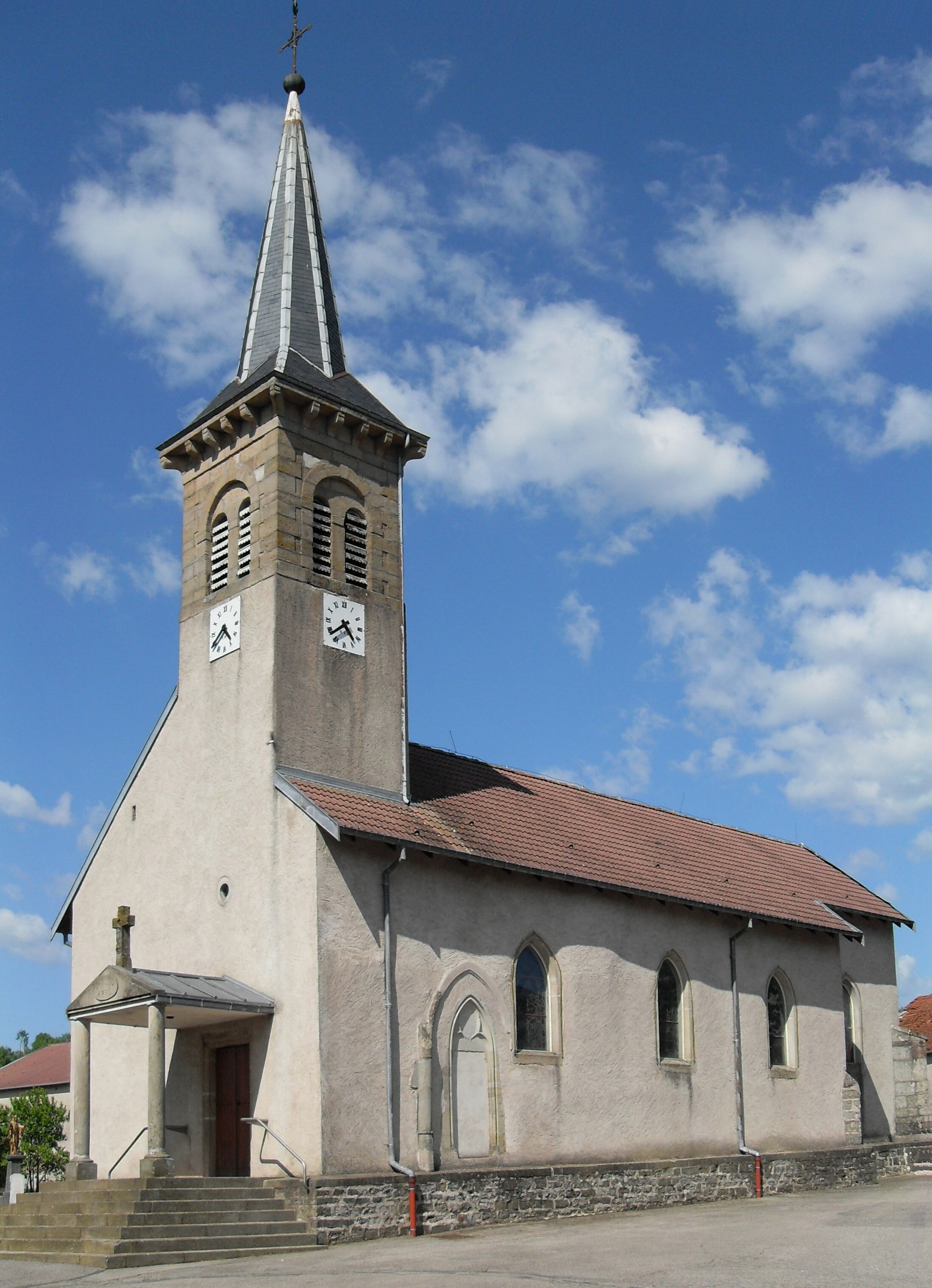 L'église Saint-Èvre à Domèvre-sur-Avière